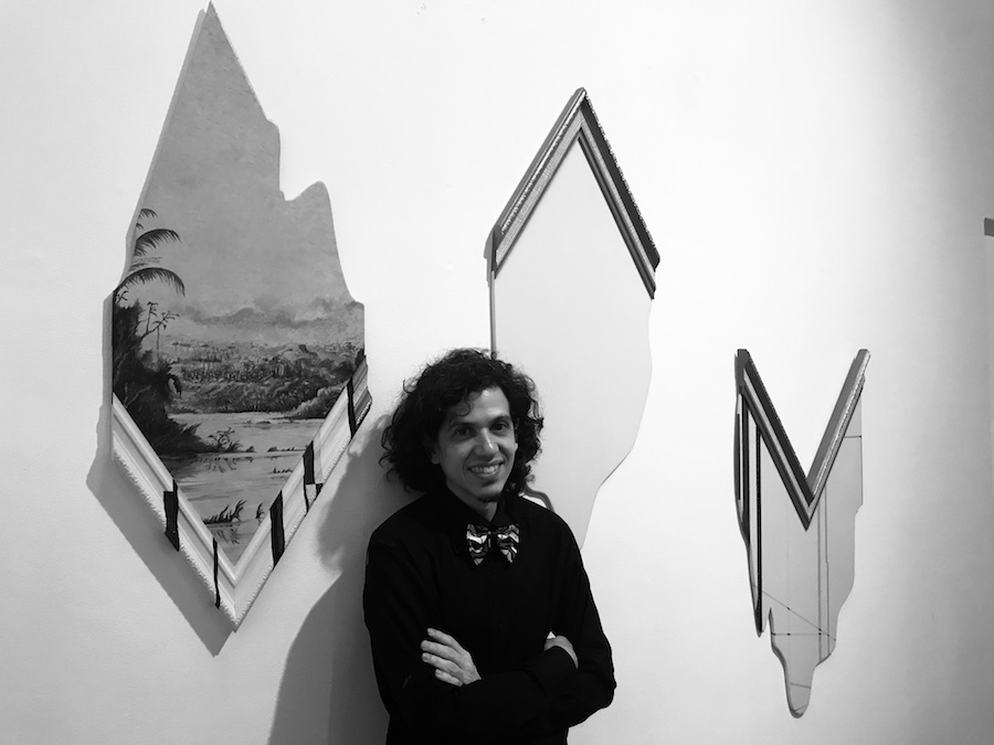 Retrato Efrain Ugueto